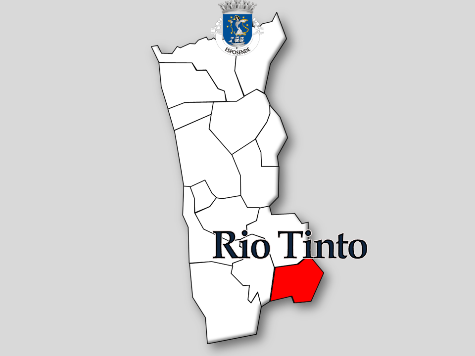 Censo 1864/2011